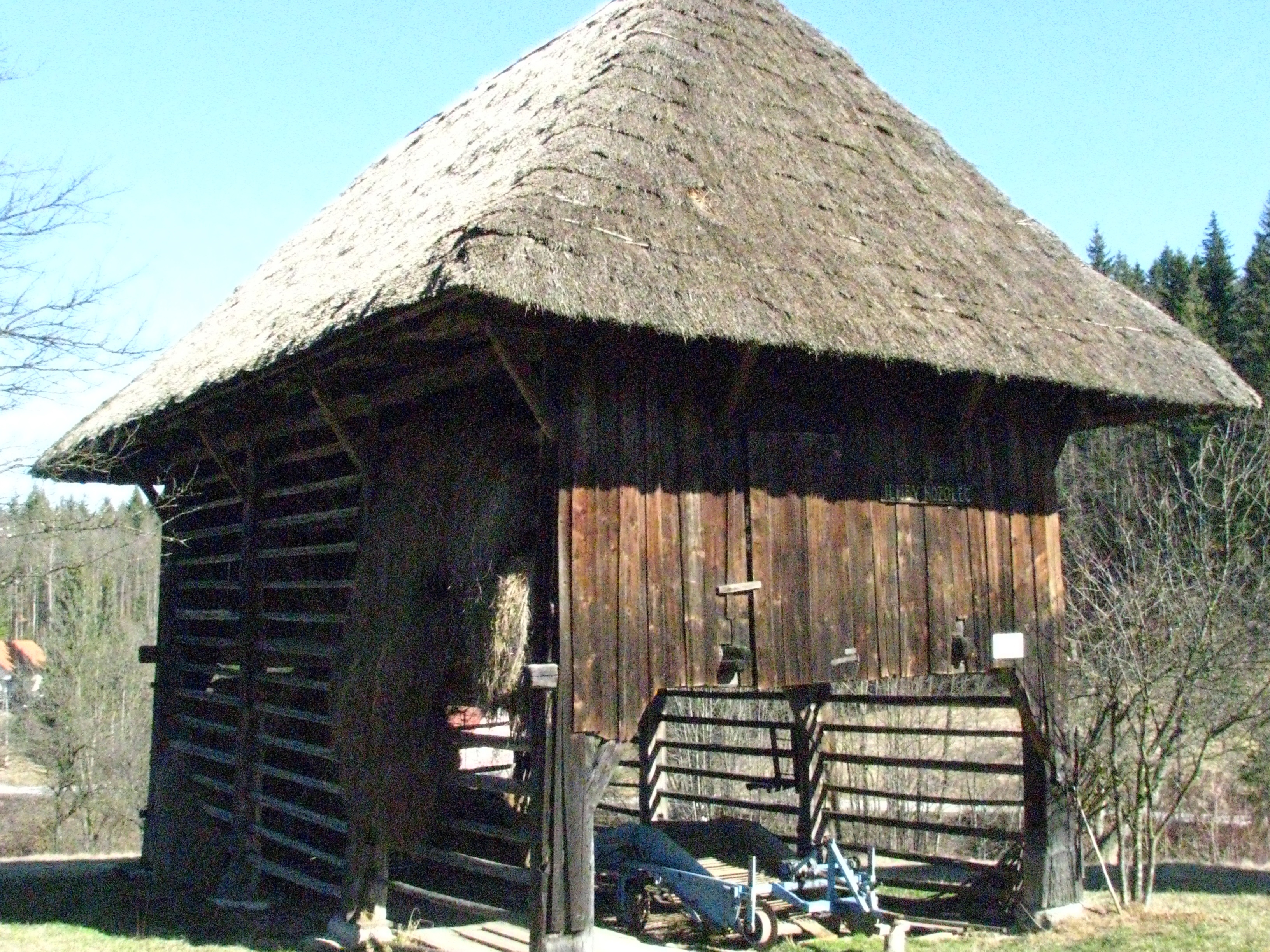 Ilija barb. Doljnje Retje, Slovenija